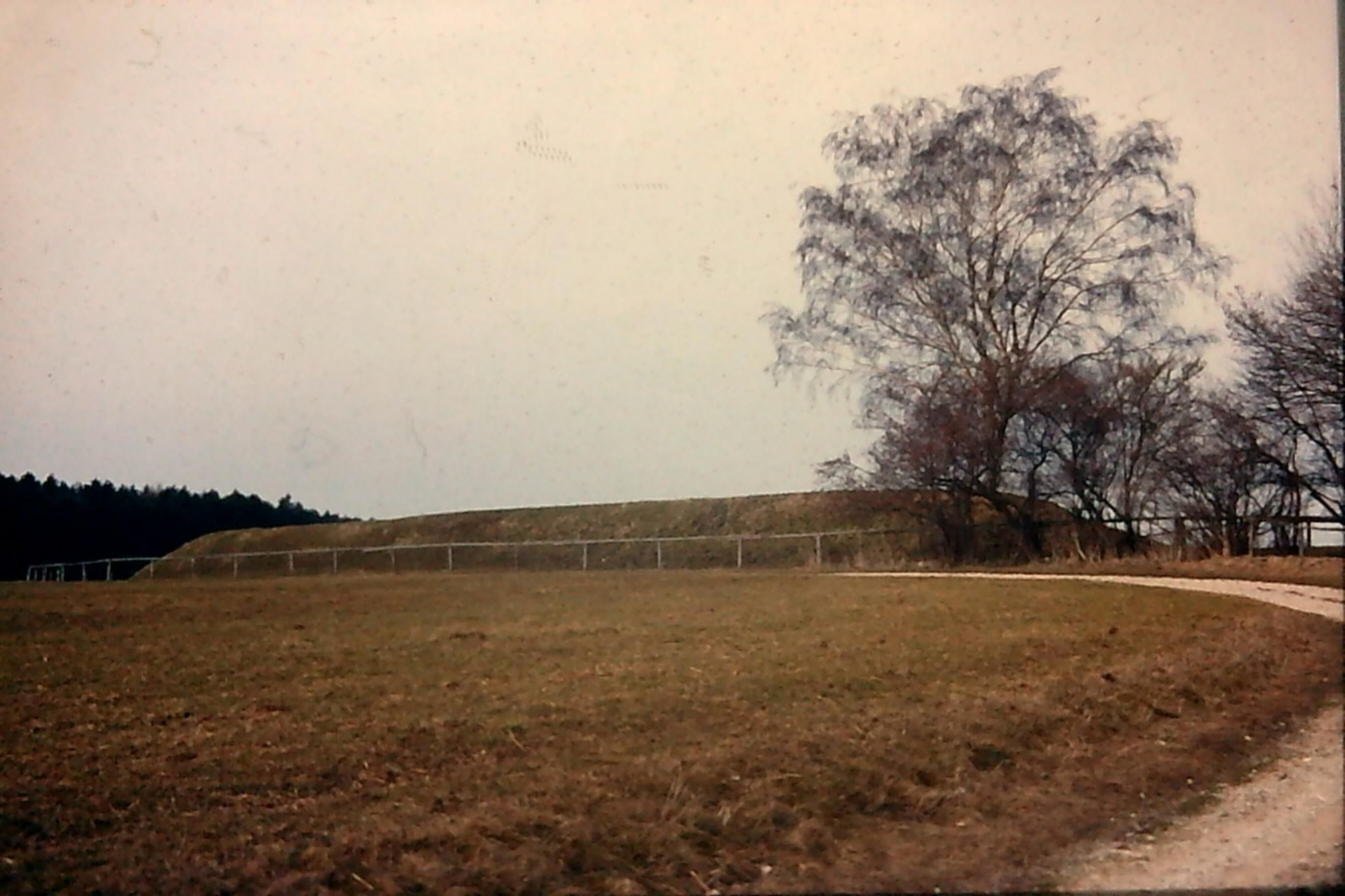 Südlicher Teil des Walles beim Schloss Emmenhausen (Waal)